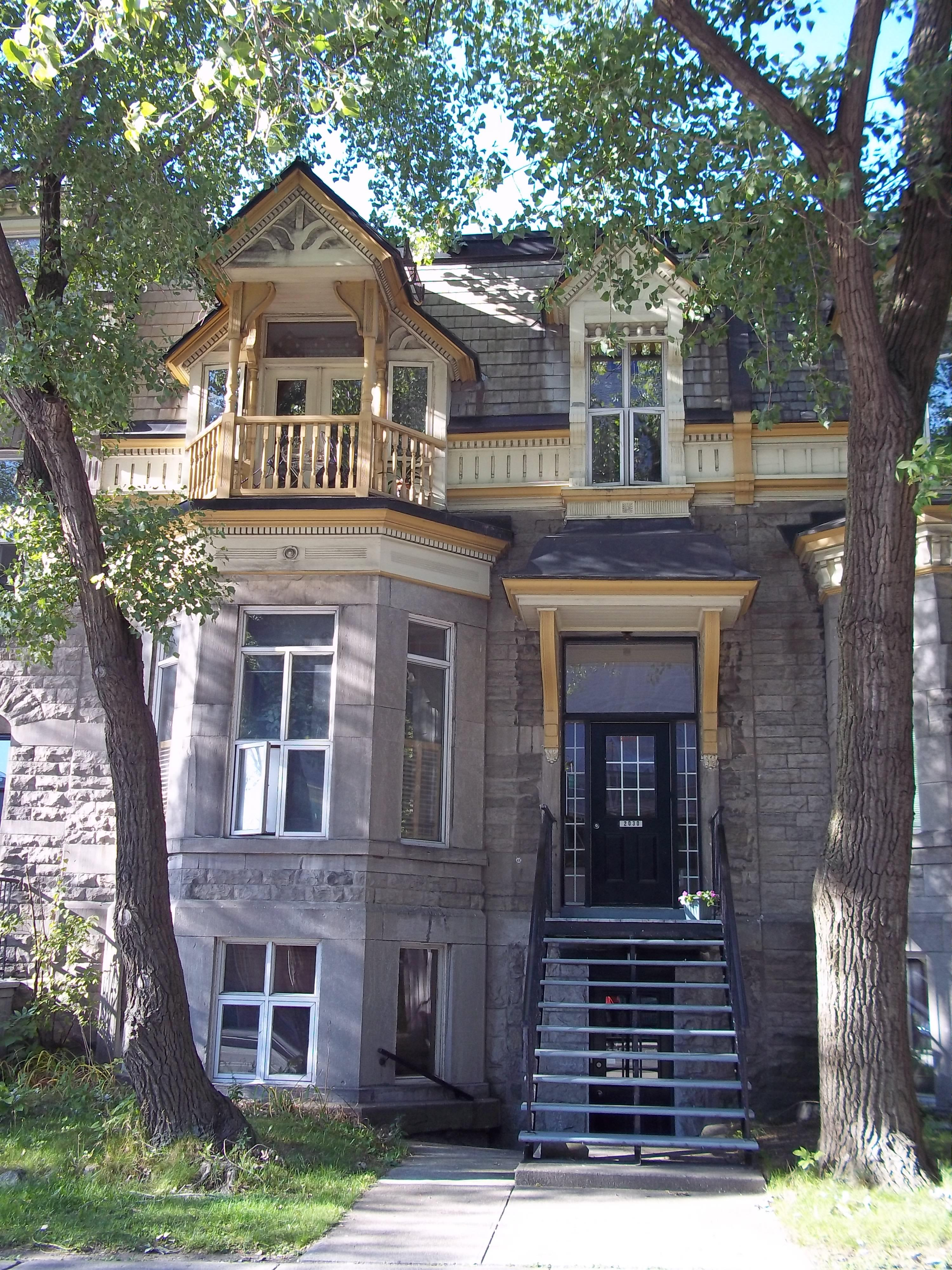 Maison John L.-Jensen, 2028-2030, rue Jeanne-Mance, Montréal